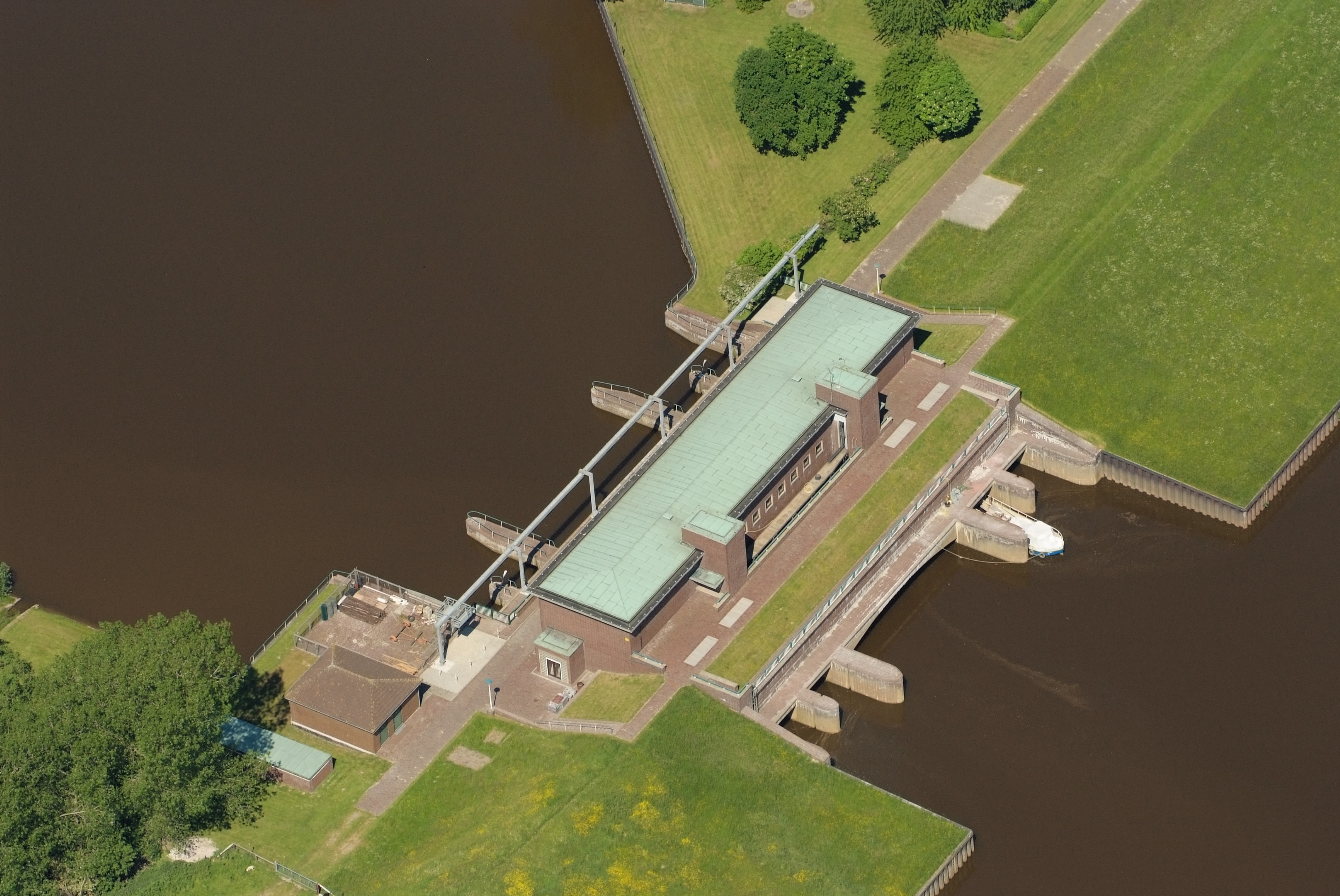 Schöpfwerk Petershörn Fotoflug vom Flugplatz Nordholz-Spieka über Cuxhaven und Wilhelmshaven